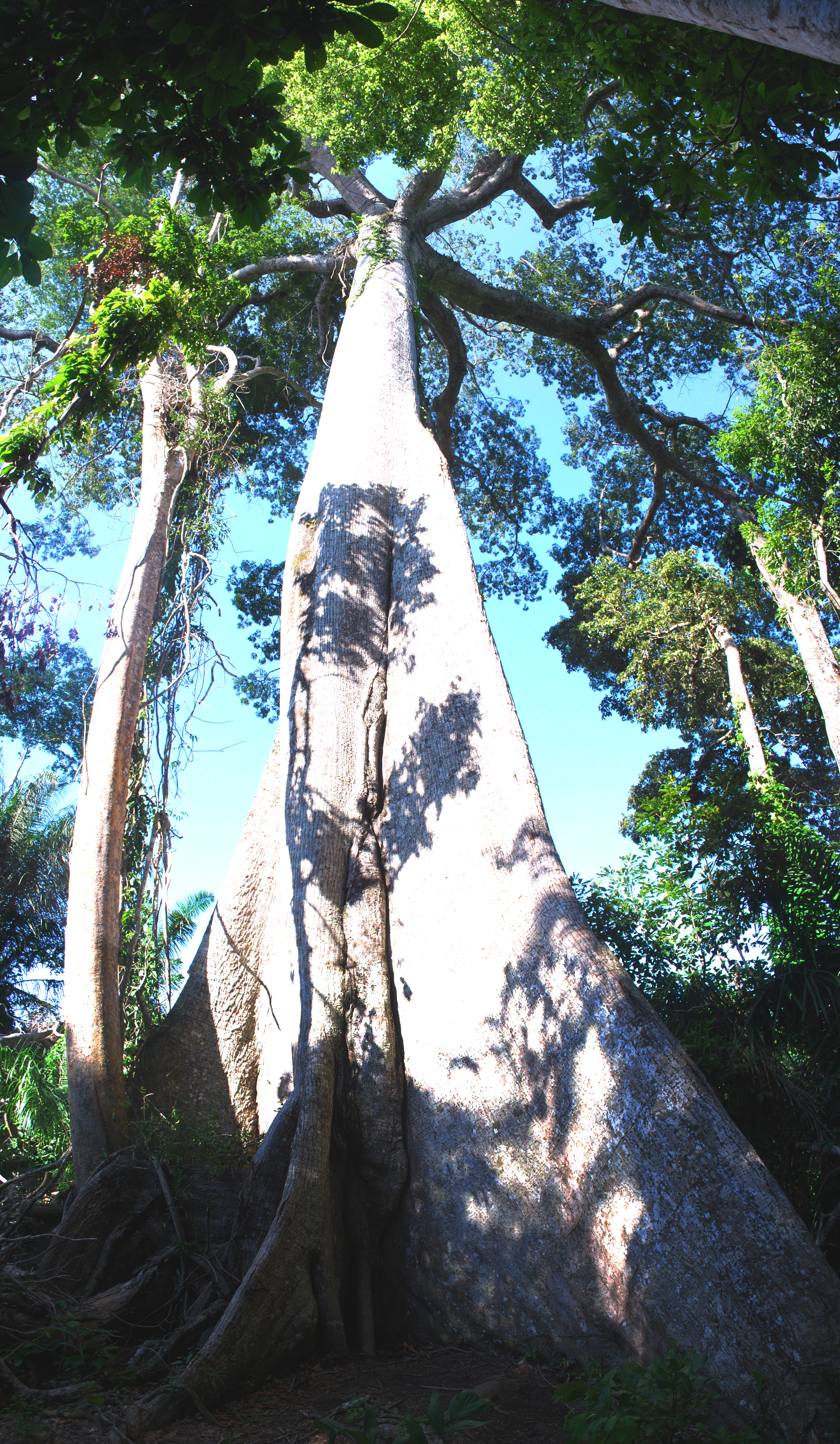 Giant Lupuna Ceiba pentandra tree vertical panorama in Puerto Maldonado, Peru.